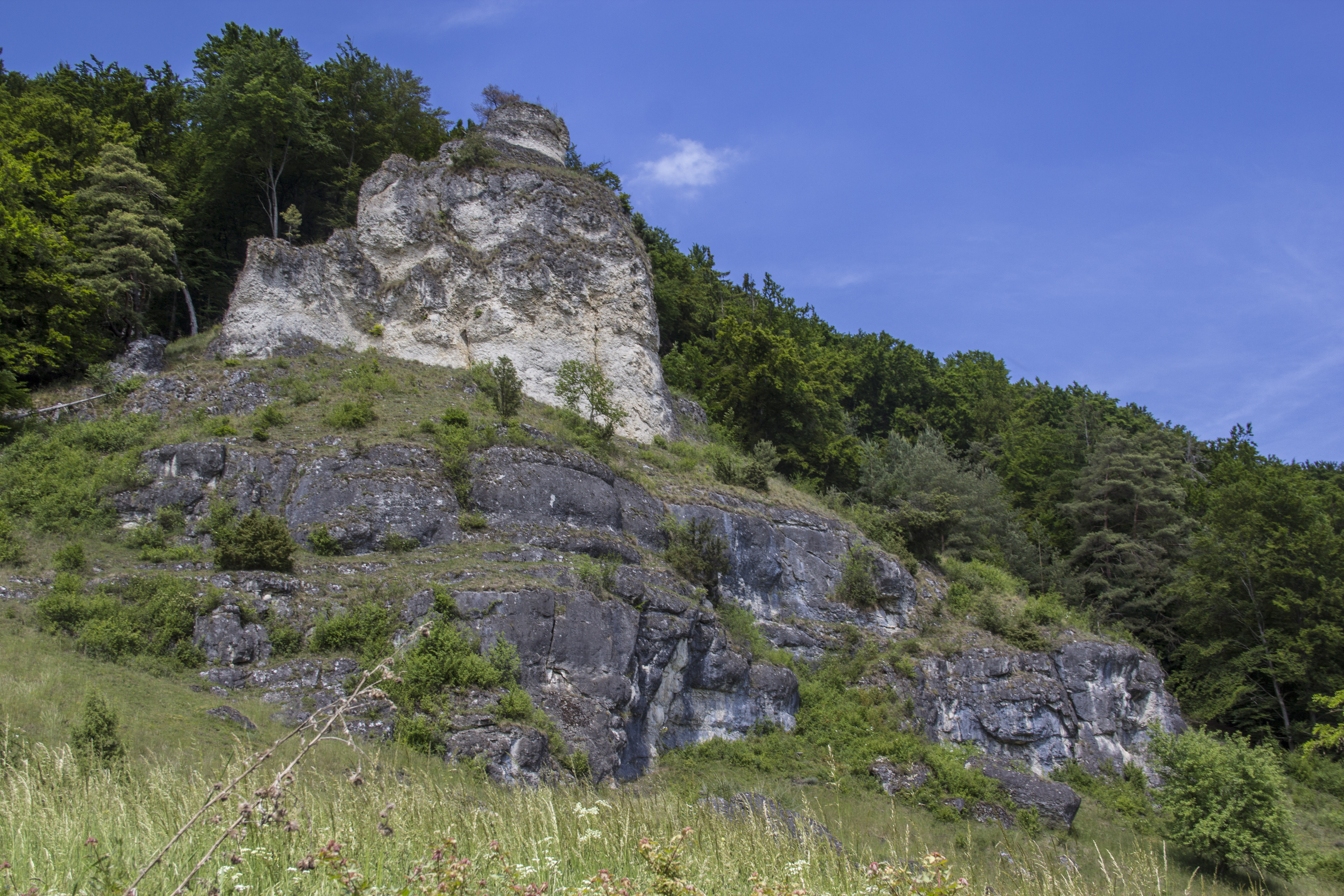 Felsformation an den Bruckwiesen am Pfahlbuck bei Böhming, Naturpark Altmühltal, Landschaftsschutzgebiet